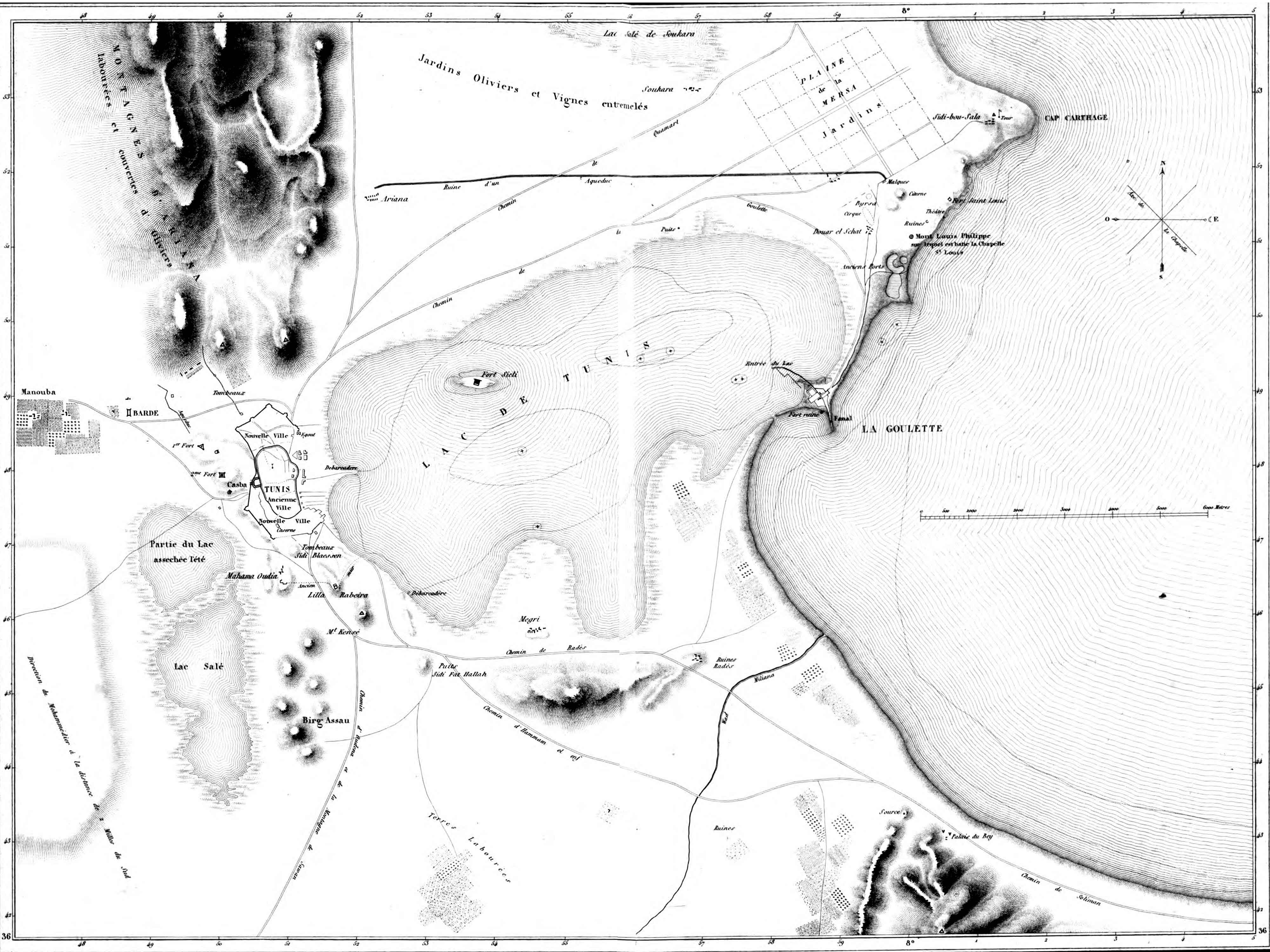 Environs de Tunis